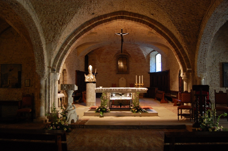 La Cripta è situata sotto la Cattedrale